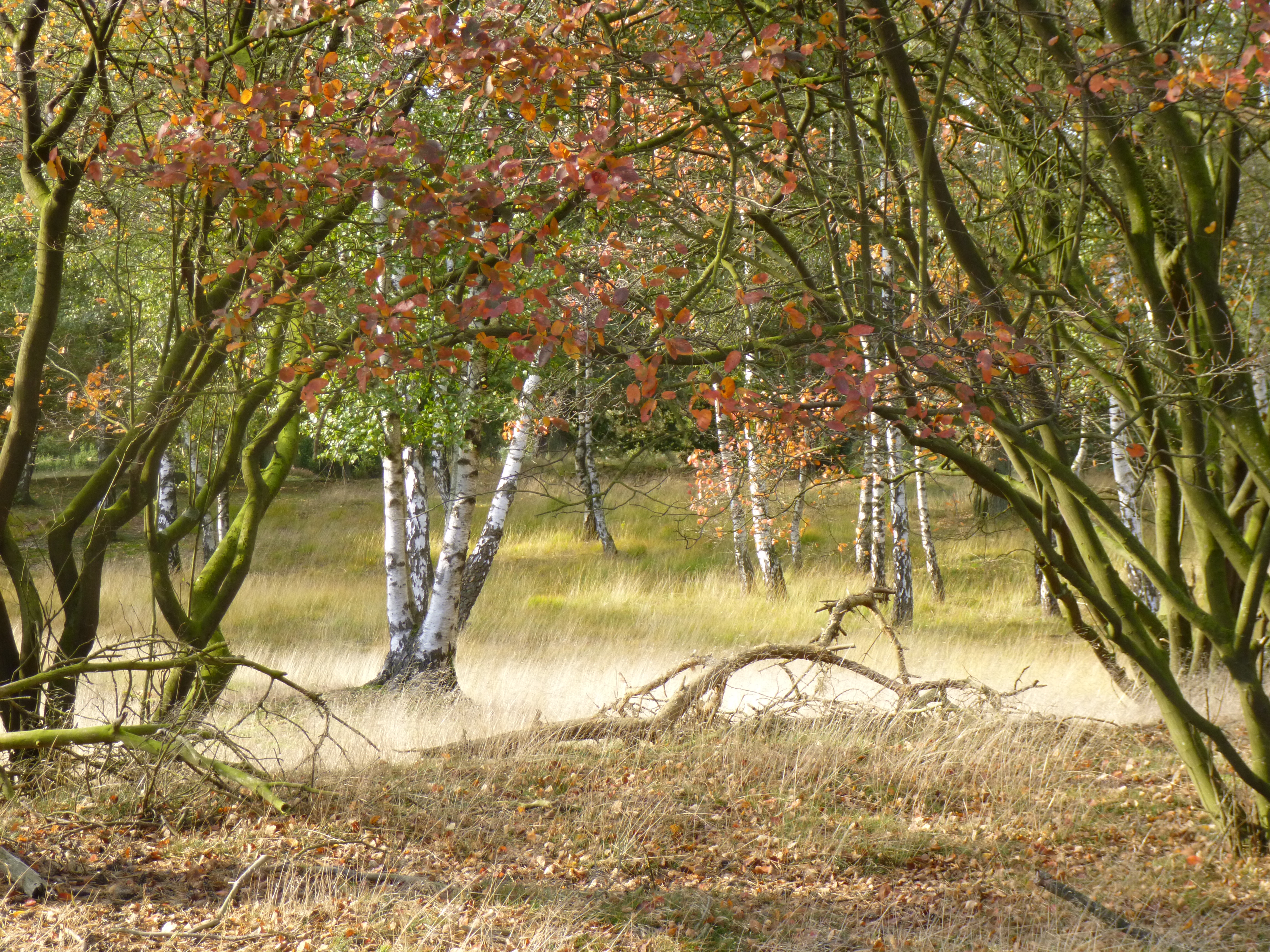 Herbstlandschaft im Naturschutzgebiet Tillenberge, Nordhorn, Grafschaft Bentheim, Niedersachsen, Deutschland